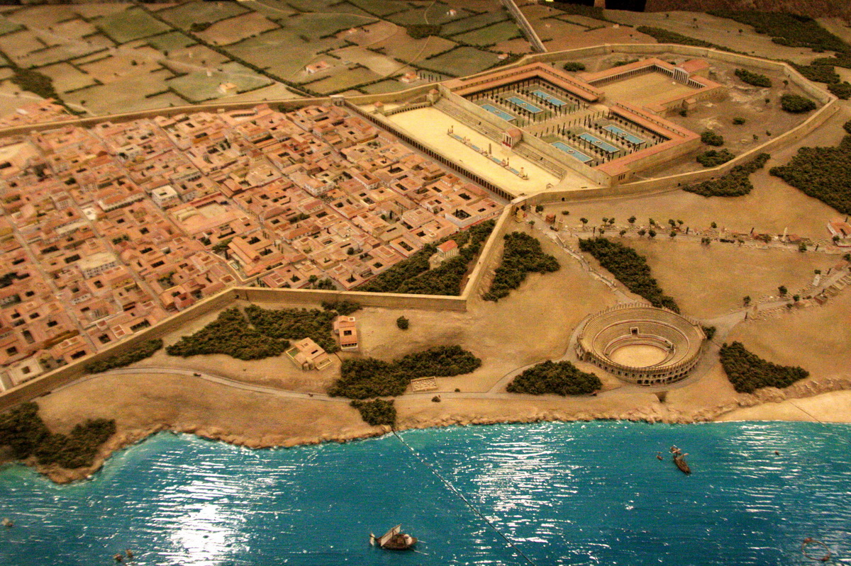 Maqueta de Tarraco Imperial on es veuen la zona superior dedicada al temple (actual ubicació de la catedral), la segona terrasa hi havia una gran plaça porxada que ubicava el Fòrum Provincial de la Tarraconense, a continuació el circ i per sota en direcció al port, hi havia la zona d'habitatges. EN primer pla es veu l'amfiteatre, encara existent.